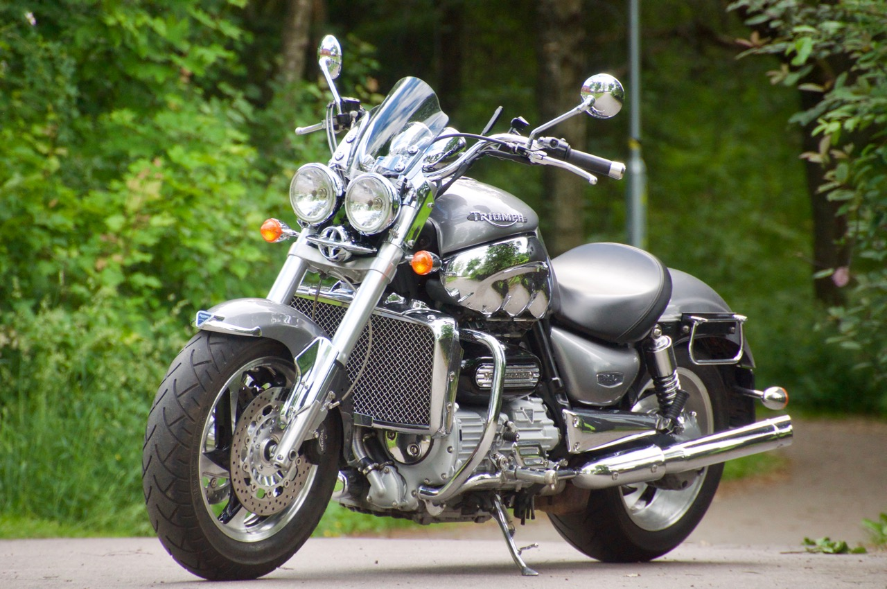 Rocket III, 2005